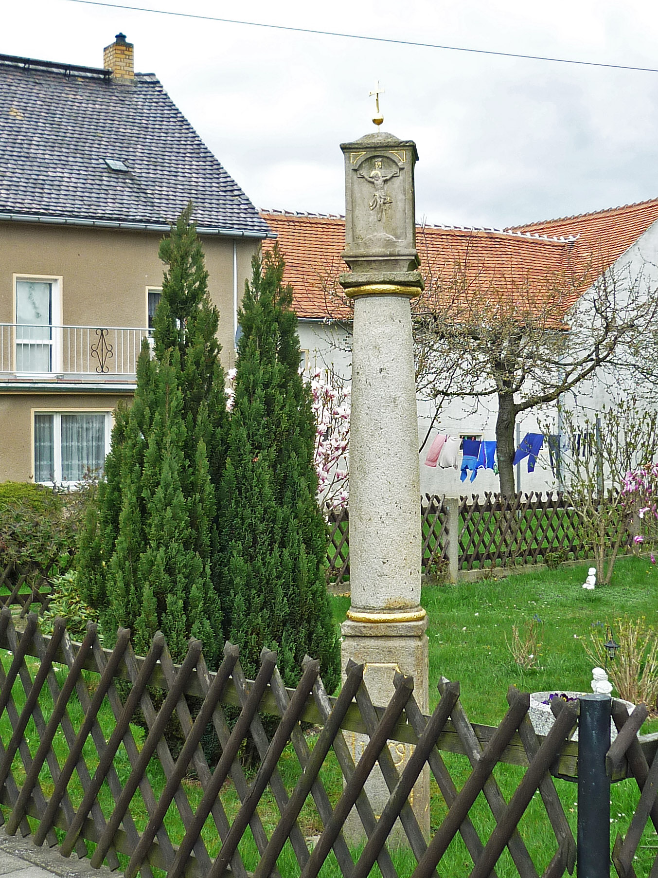 Bildstock in Gränze (Ralbitz-Rosenthal), Am Teichdamm 2 Hornjoserbsce: Stołp w Hrańcy